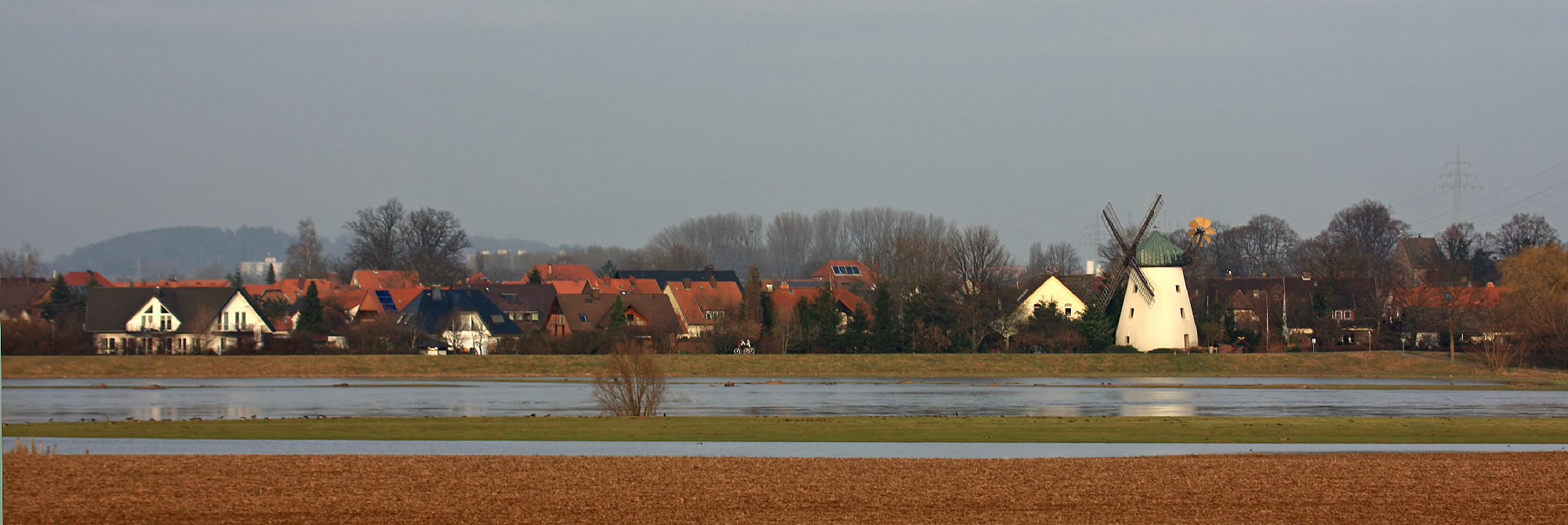 Weserdorf Tündern mit Windmühle und Weserradweg